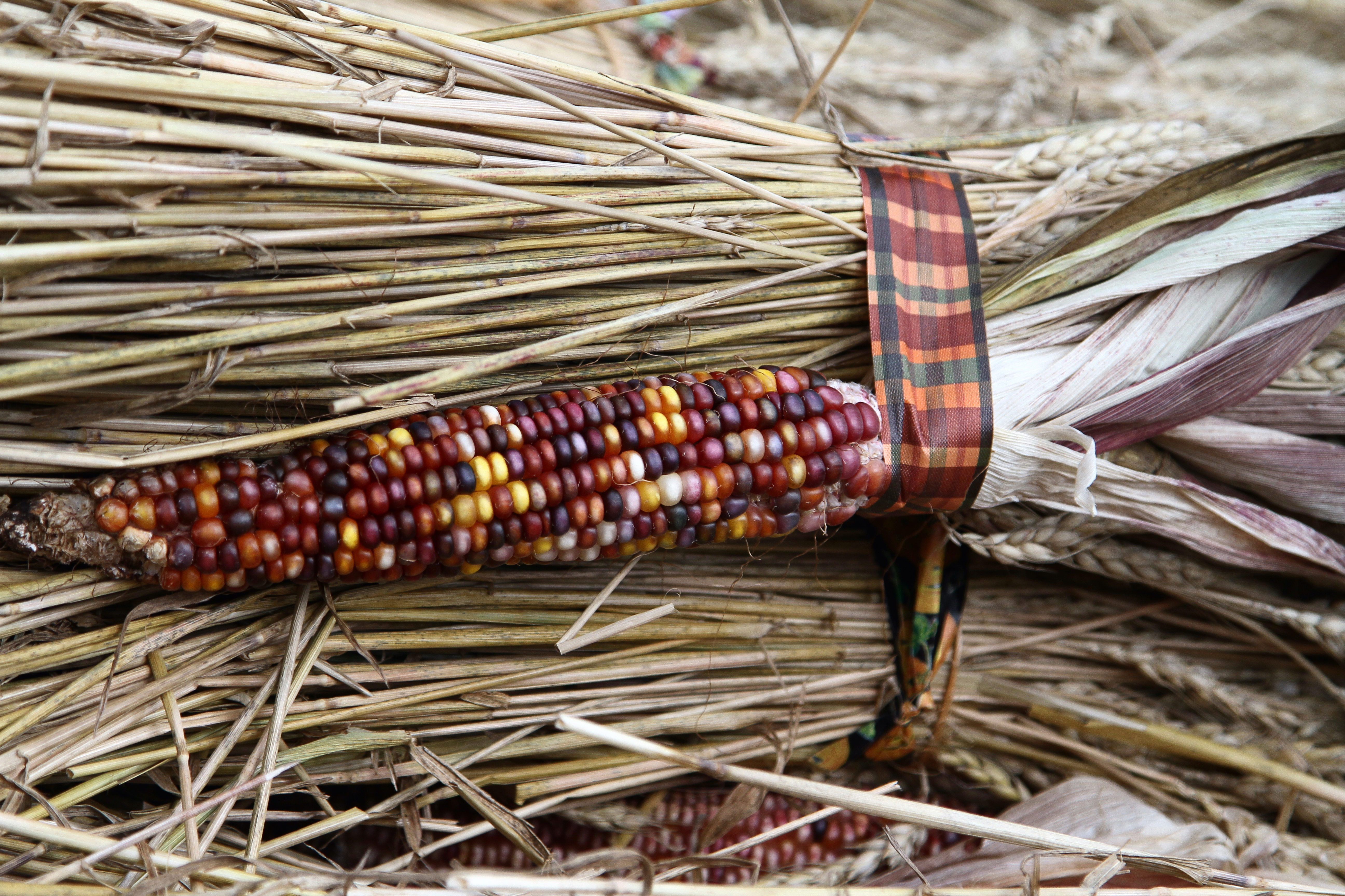 Indian Corn (Zea mays indurata) September 19, 2102